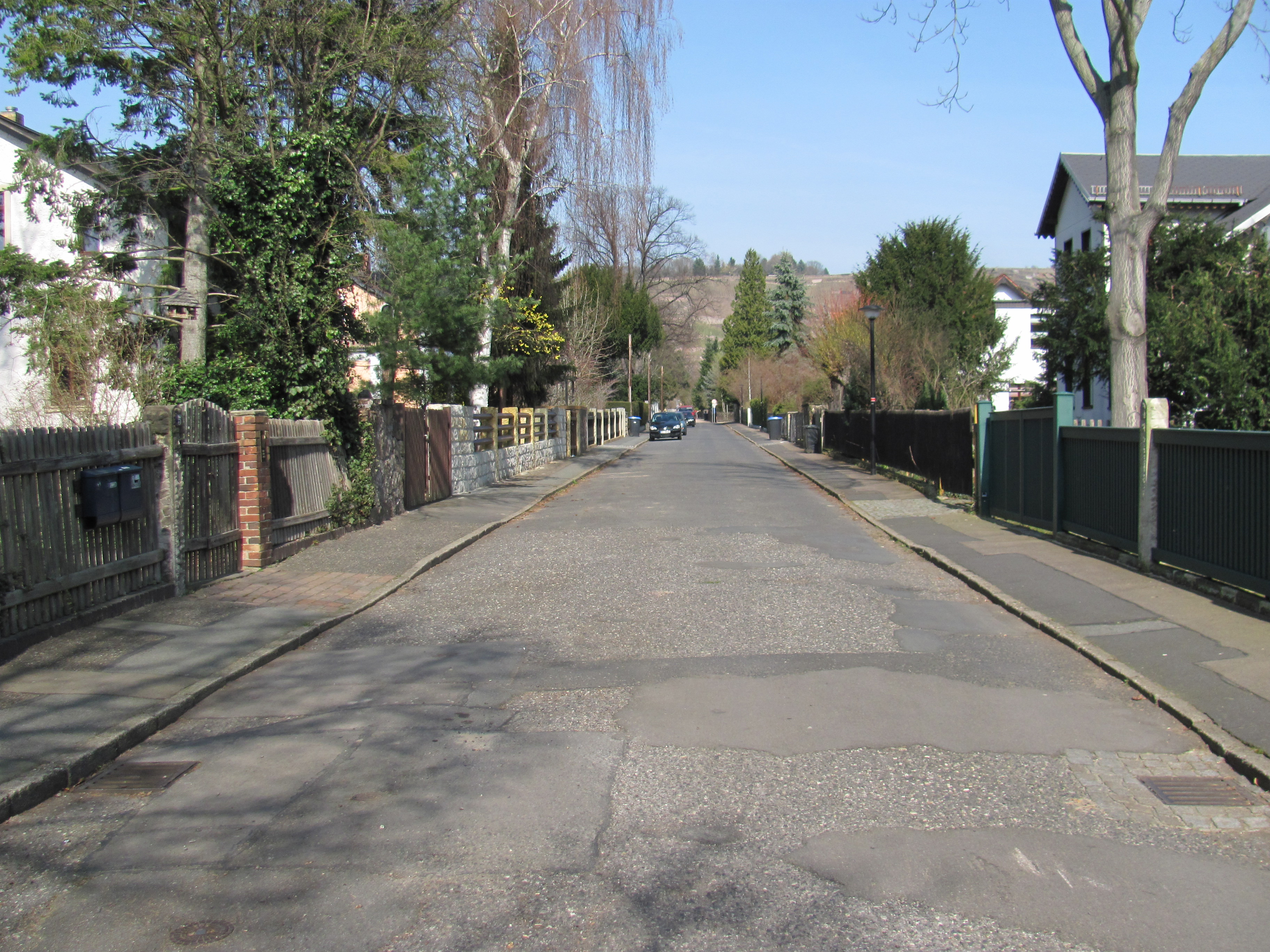 Radebeul-Niederlößnitz, Schweizerstraße nach Norden